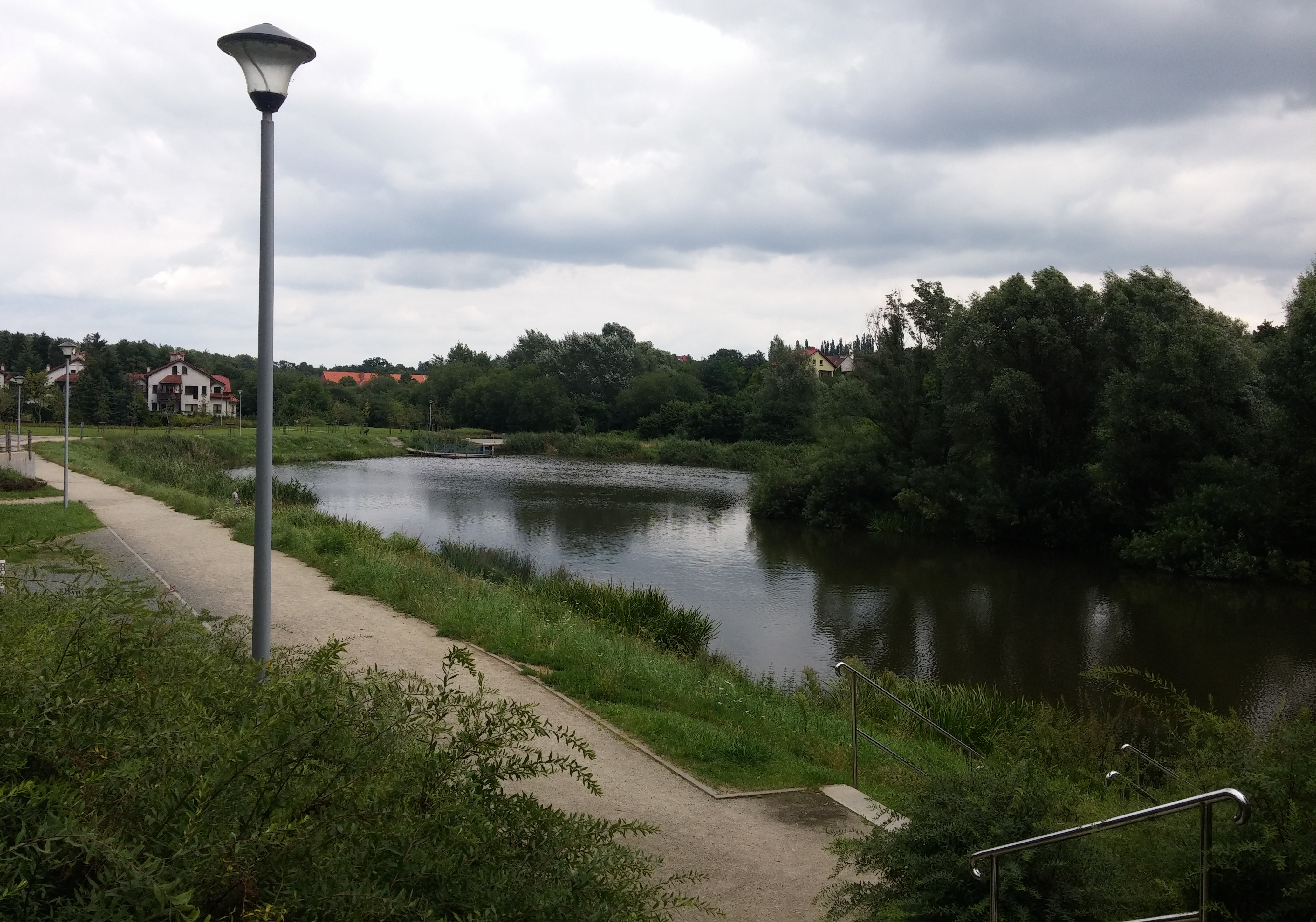 Zieleniec oraz zbiornik retencyjny Wileńska (Piecki-Migowo).